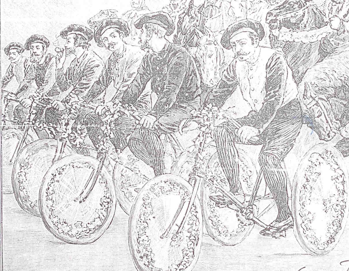 Faluchards montés sur des vélos fleuris participant à la cavalcade de la Mi-Carême 1893 à Paris.